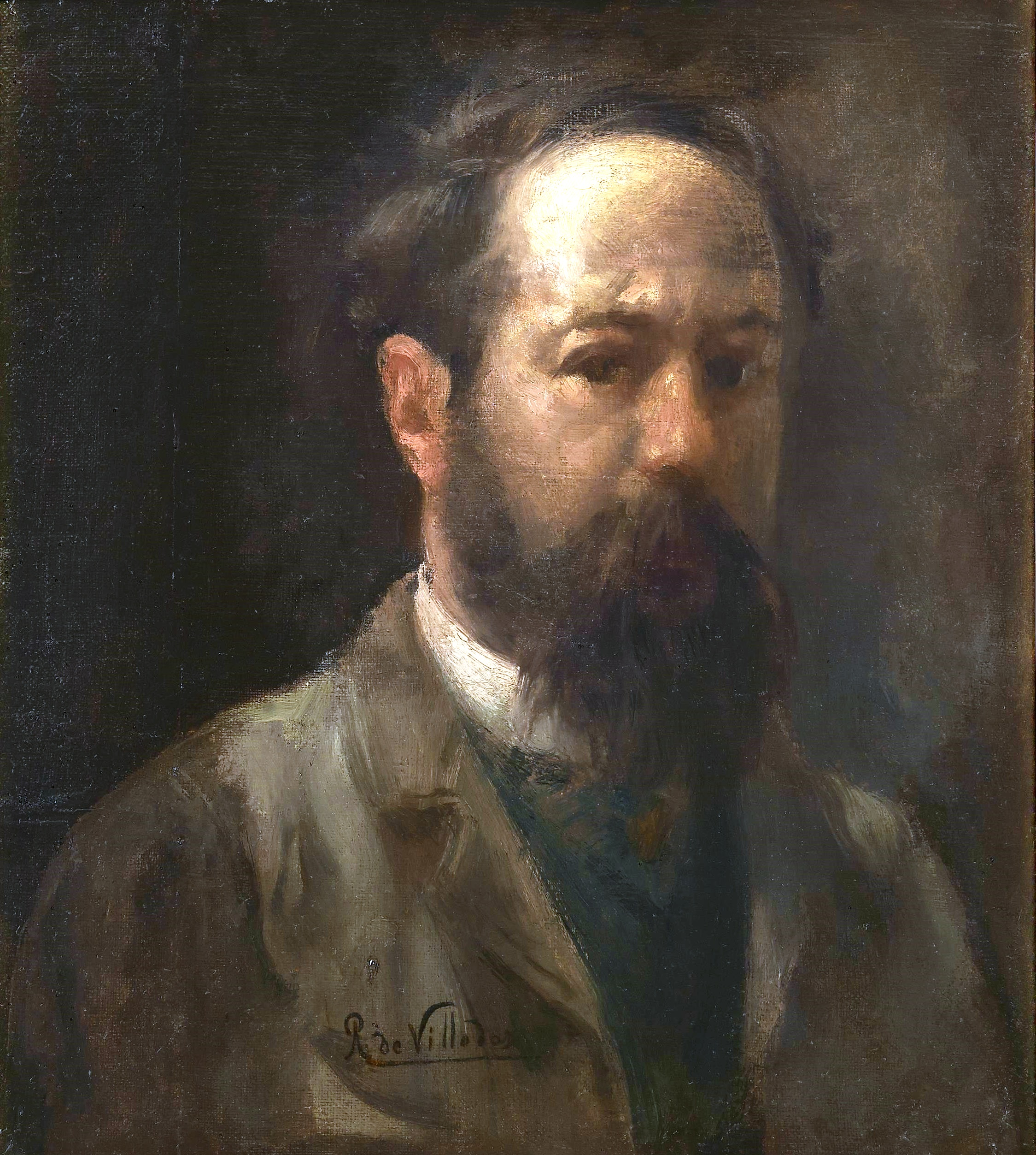 Autorretrato del pintor español Ricardo de Villodás y de la Torre (1846-1904).